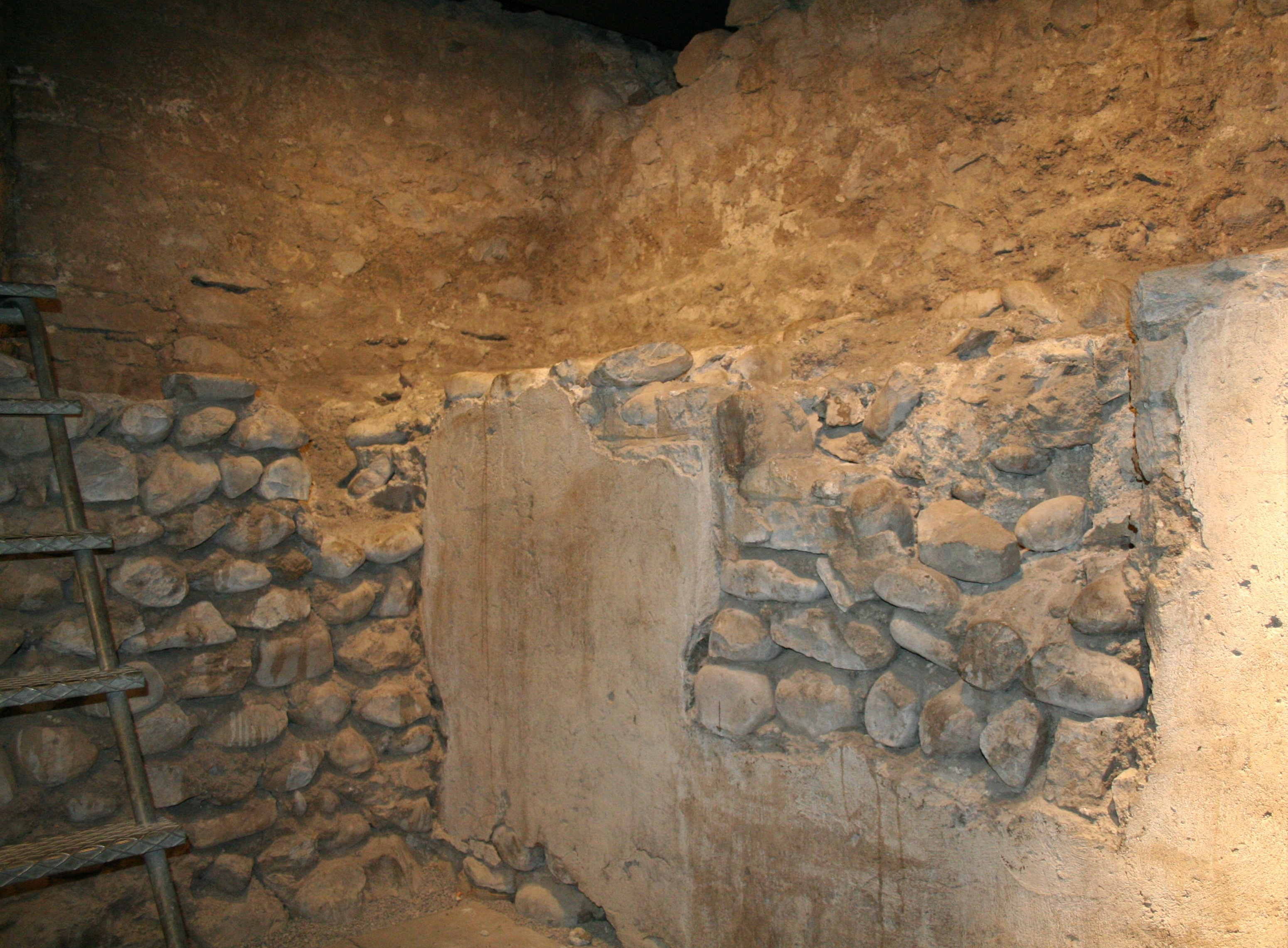 Reste römischer Besiedlung unter dem Lindenhof in Zürich